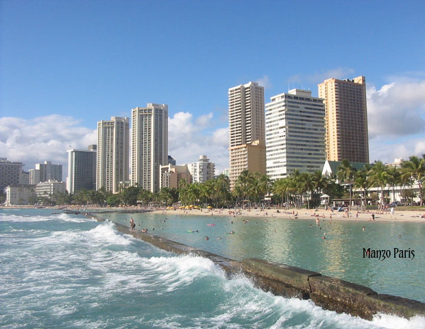 Honolulu Hawaii